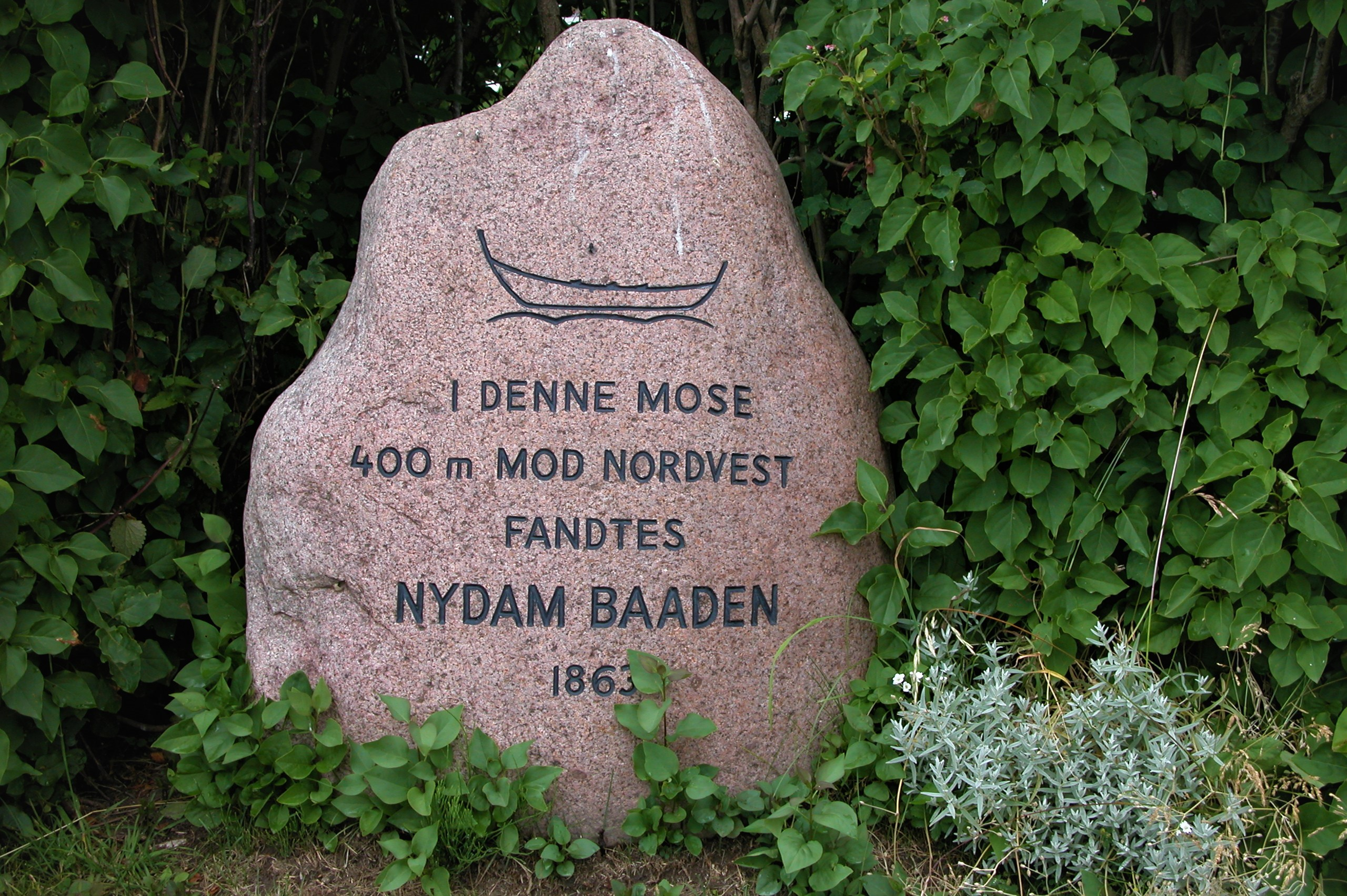 Mindesten ved Nydam Mose, Øster Sottrup, Danmark